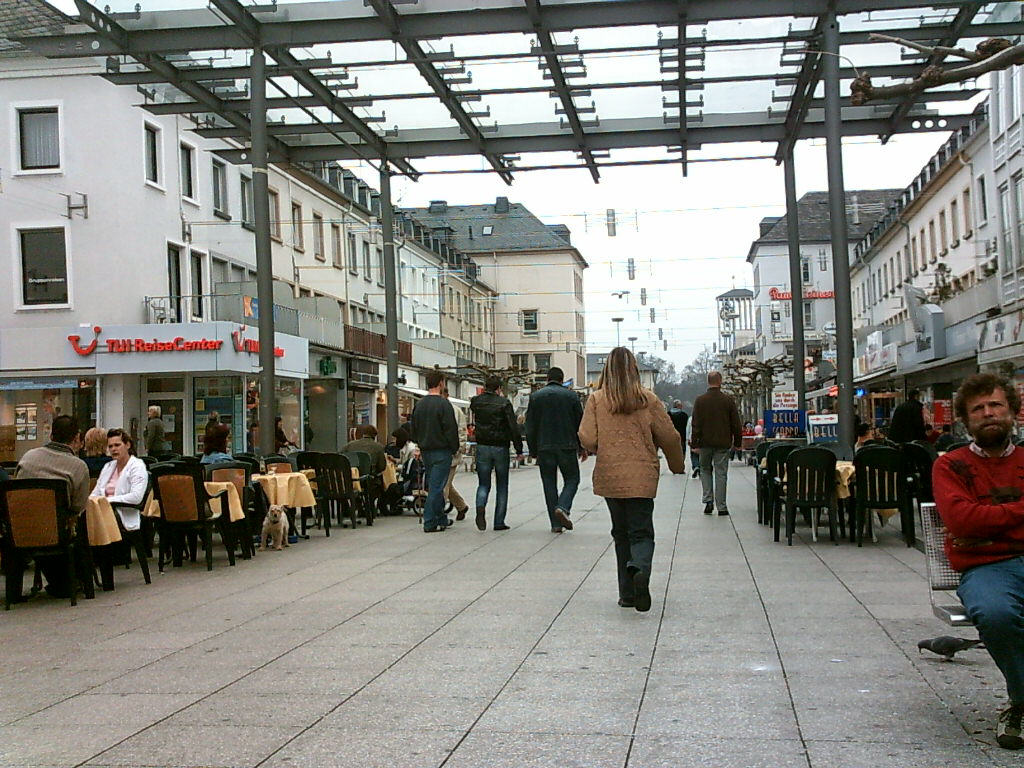 Fußgängerzone Saarlouis, selbst fotografiert, 2005